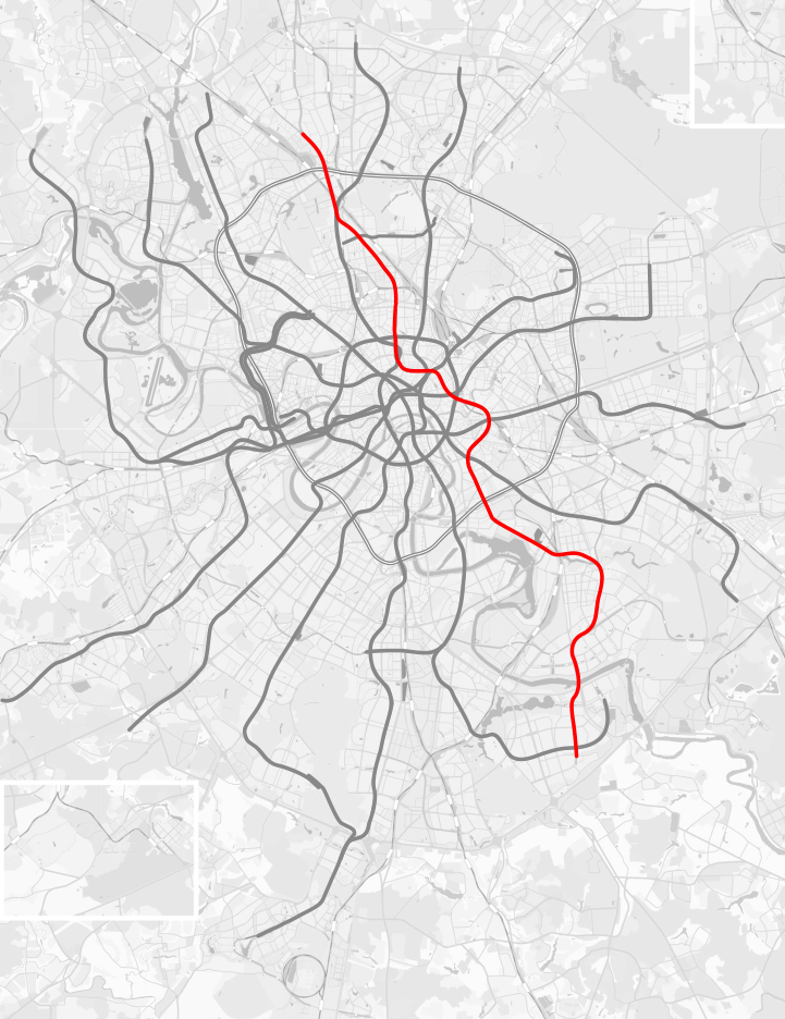 Люблинско-Дмитровская линия Московского метрополитена